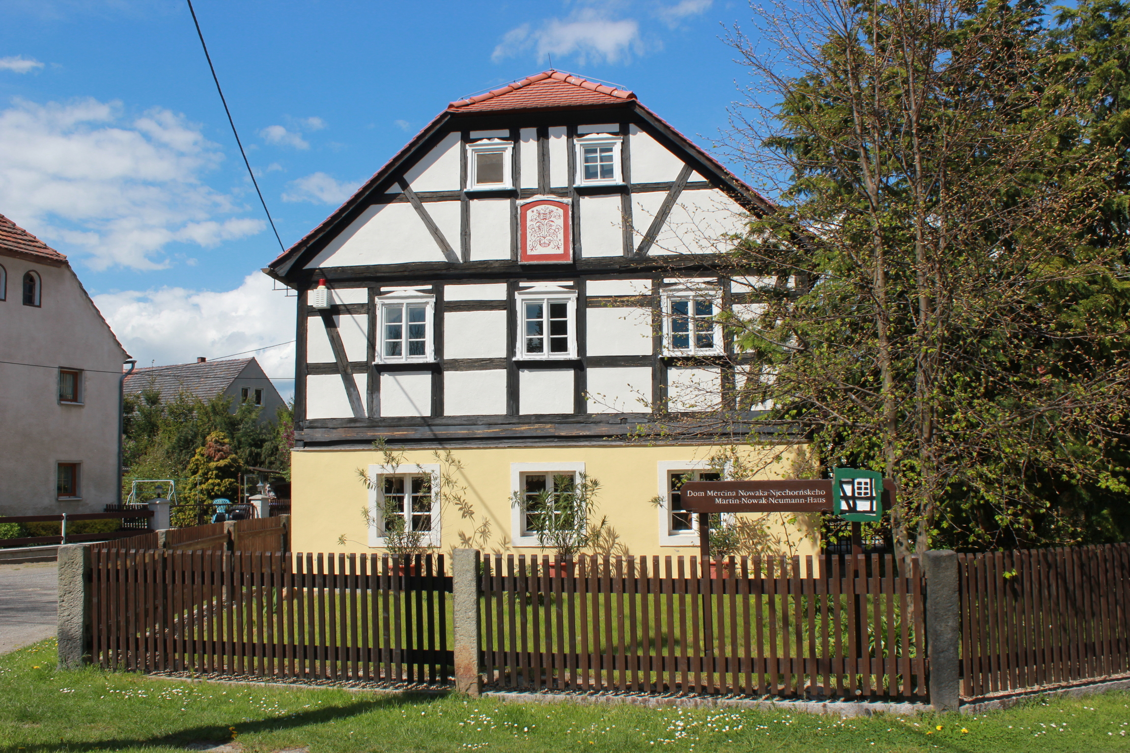 Hornjoserbsce: Njechorń; Dom Měrćina Nowaka-Njechorńskeho.